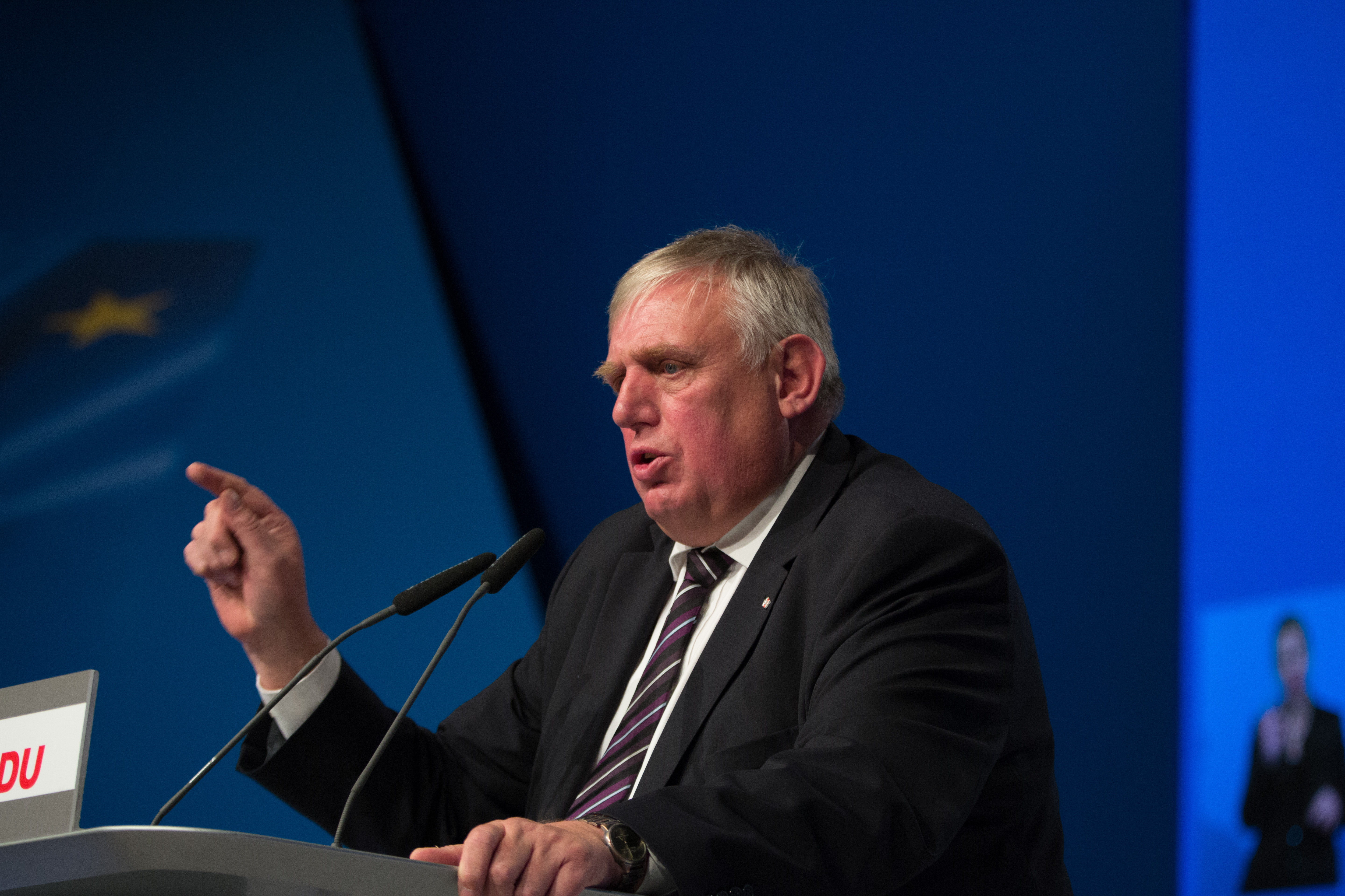 Karl-Josef Laumann, Mitglied des CDU-Bundesvorstandes auf dem 29. Parteitag der CDU Deutschlands am 6. Dezember 2016 in Essen, Grugahalle